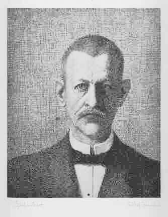 Gustaf Isander, konstnär. (1863-1929) Självporträtt